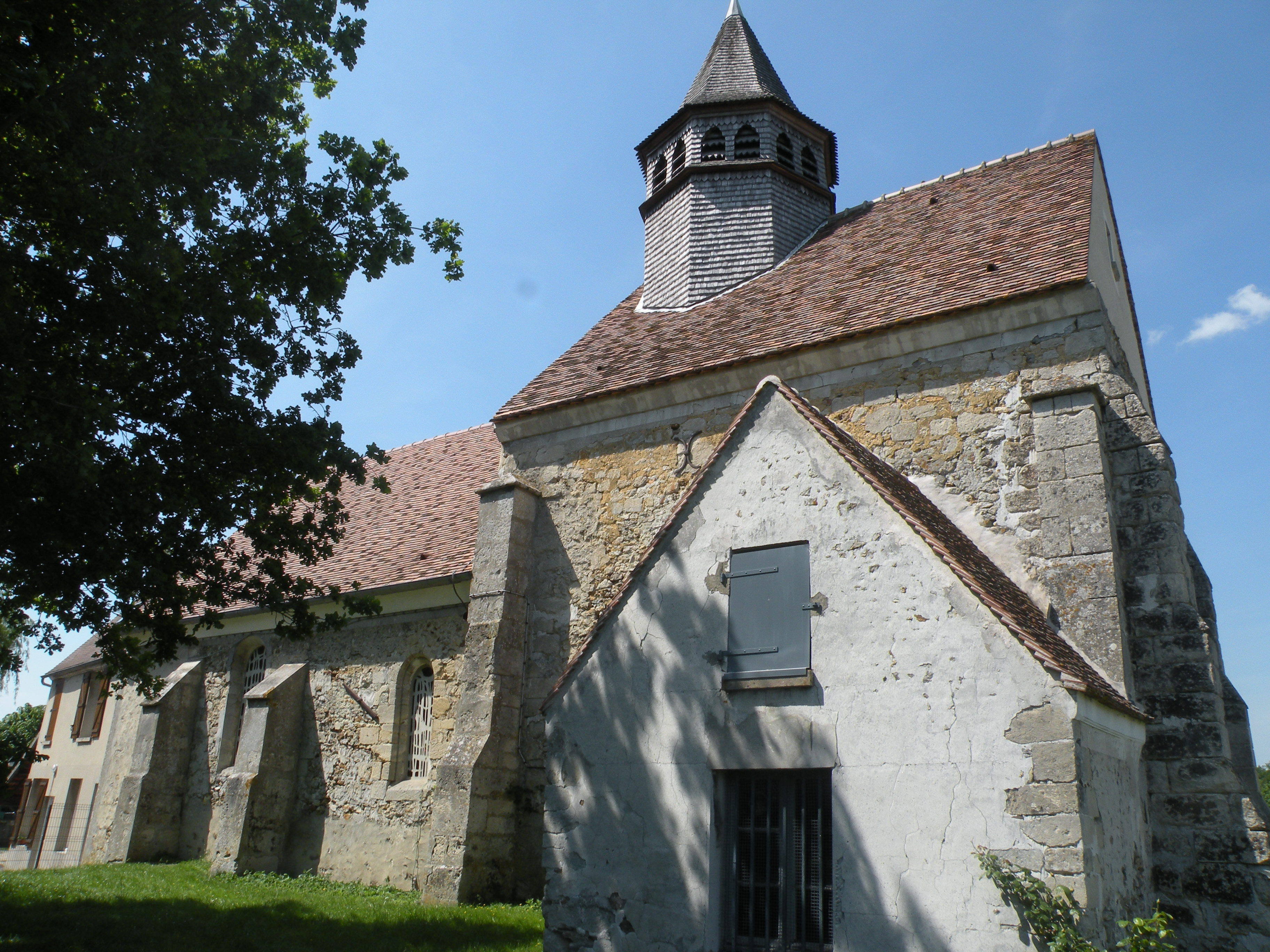 église Le Heaulme